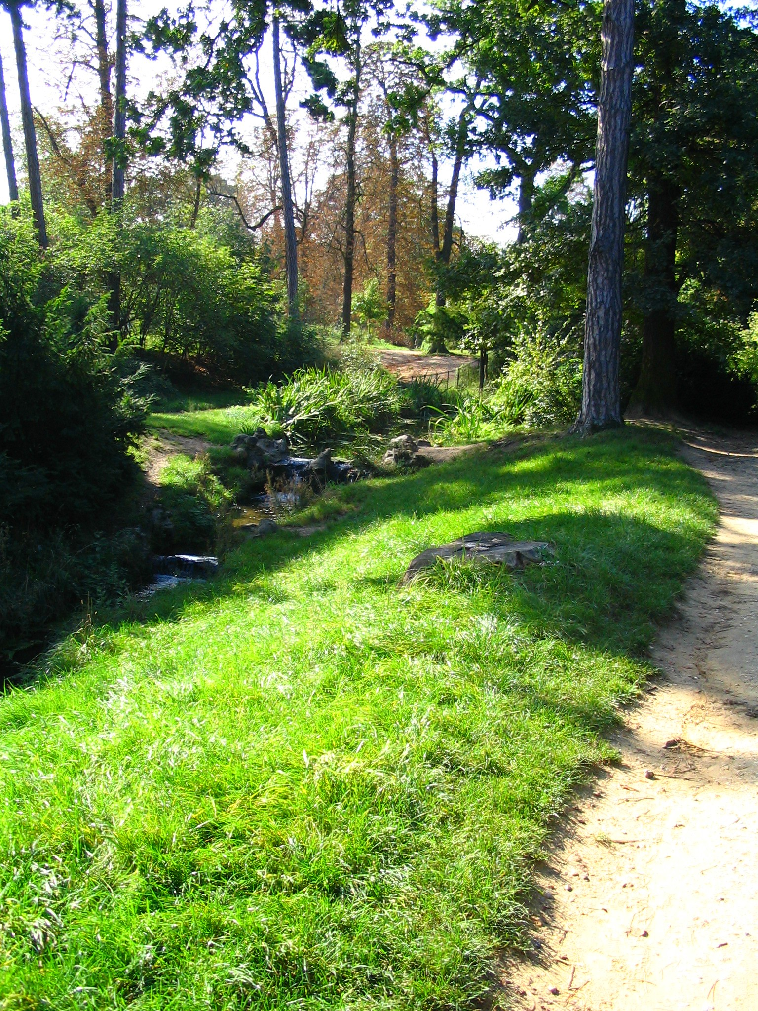 Allée dans le Bois de Vincennes - France Alley in the Bois de Vincennes near Paris - France Auteur/author: P.Charpiat - 2006